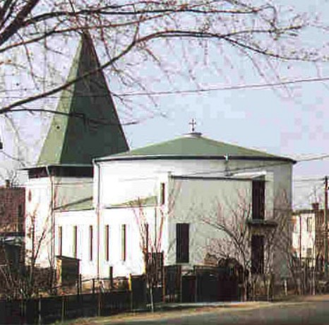 Felsőpakonyi római katolikus templom, 1994